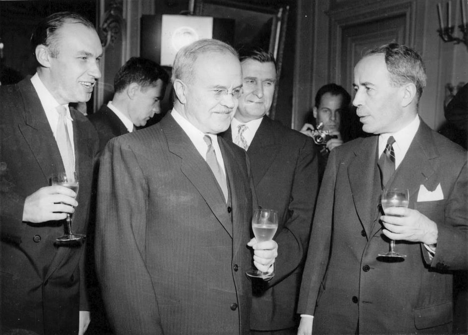 En fryntlig Molotov i samtal med utrikesminister Pinay vid en kvällsbjudning i Genève.Genèvemötet slut på onsdag. Ny konferens väntas 1956.De fyra stormakternas utrikesministrar, som hittills inte har kunnat enas om en enda punkt på Genèvekonferensens dagordning, fattade på fredagen det enhälliga beslutet att försöka avsluta förhandlingarna nästa vecka.